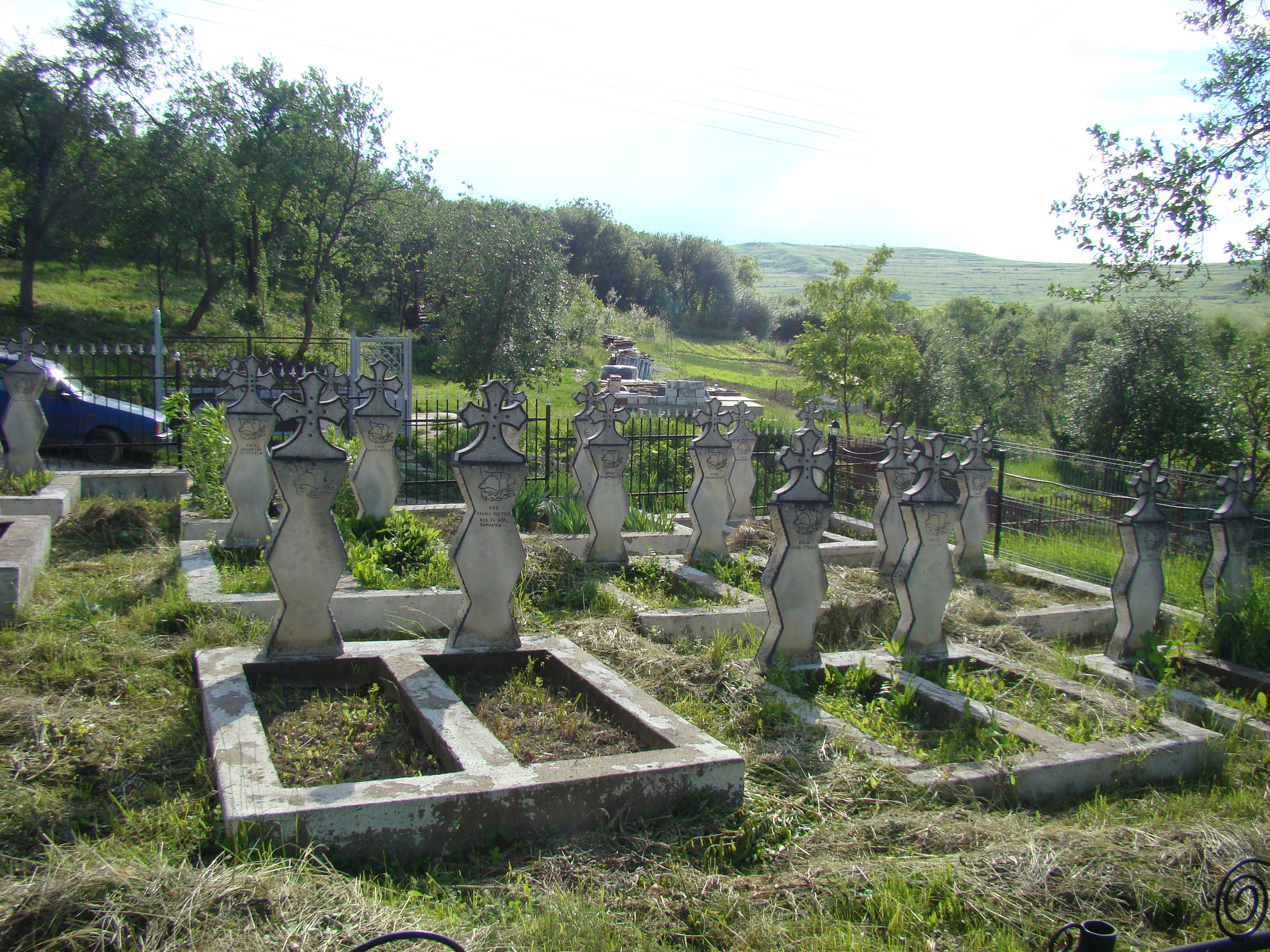 Biserica „Sfinții Arhangheli Mihail și Gavriil”, sat FEIURDENI; comuna CHINTENI, județul Cluj